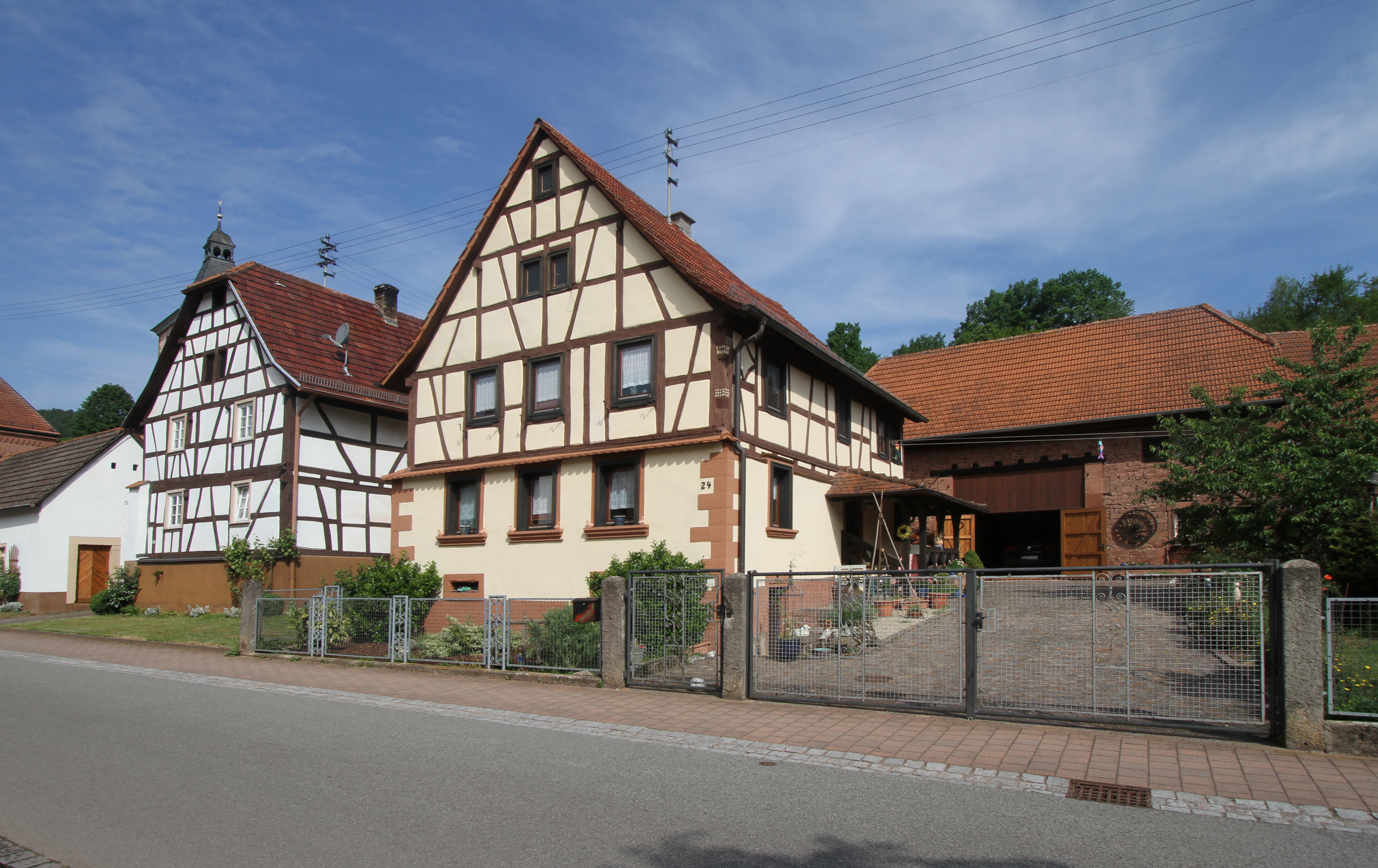 Denkmalgeschütztes Haus in Rumbach.